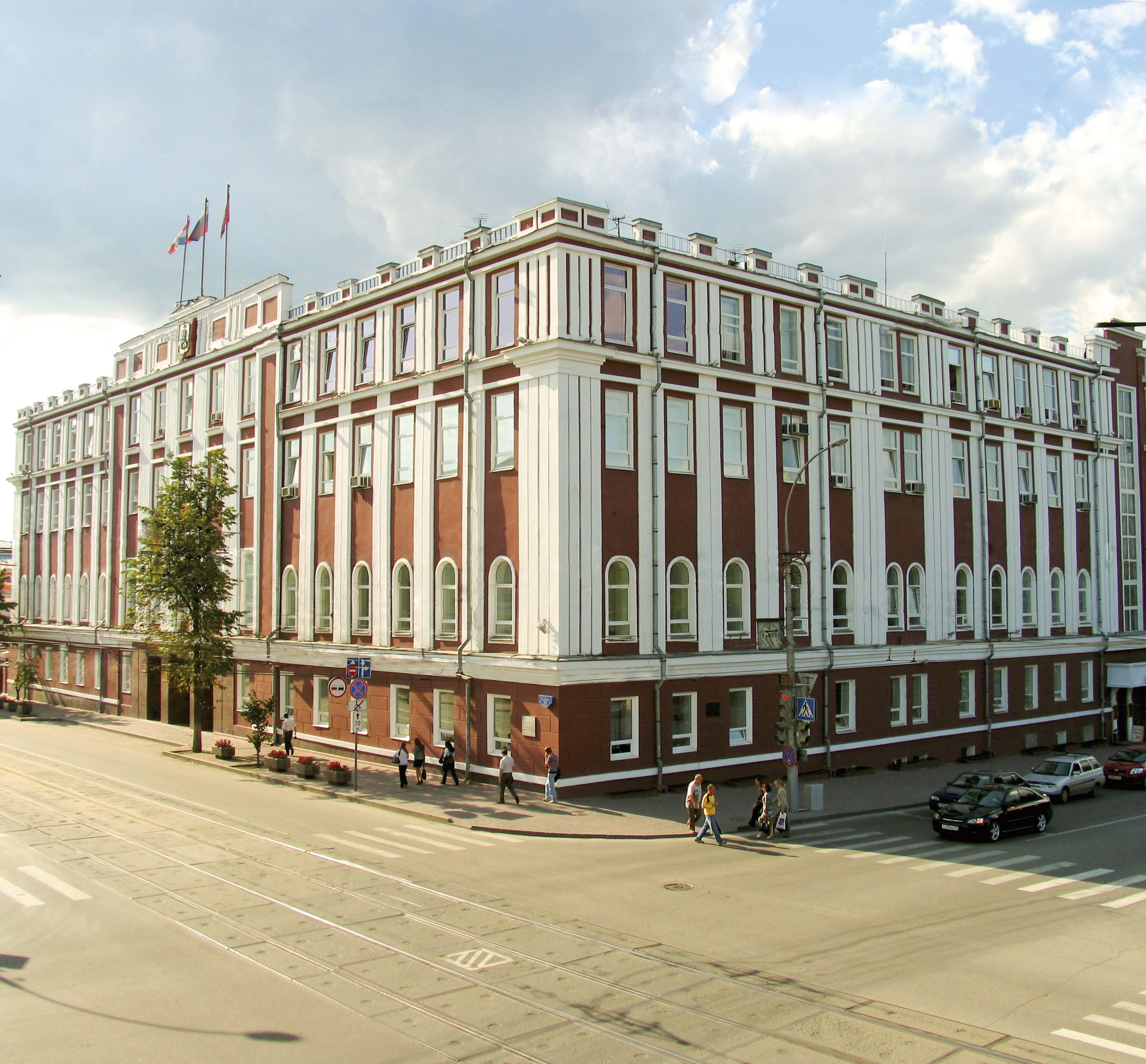 Фото здания Думы